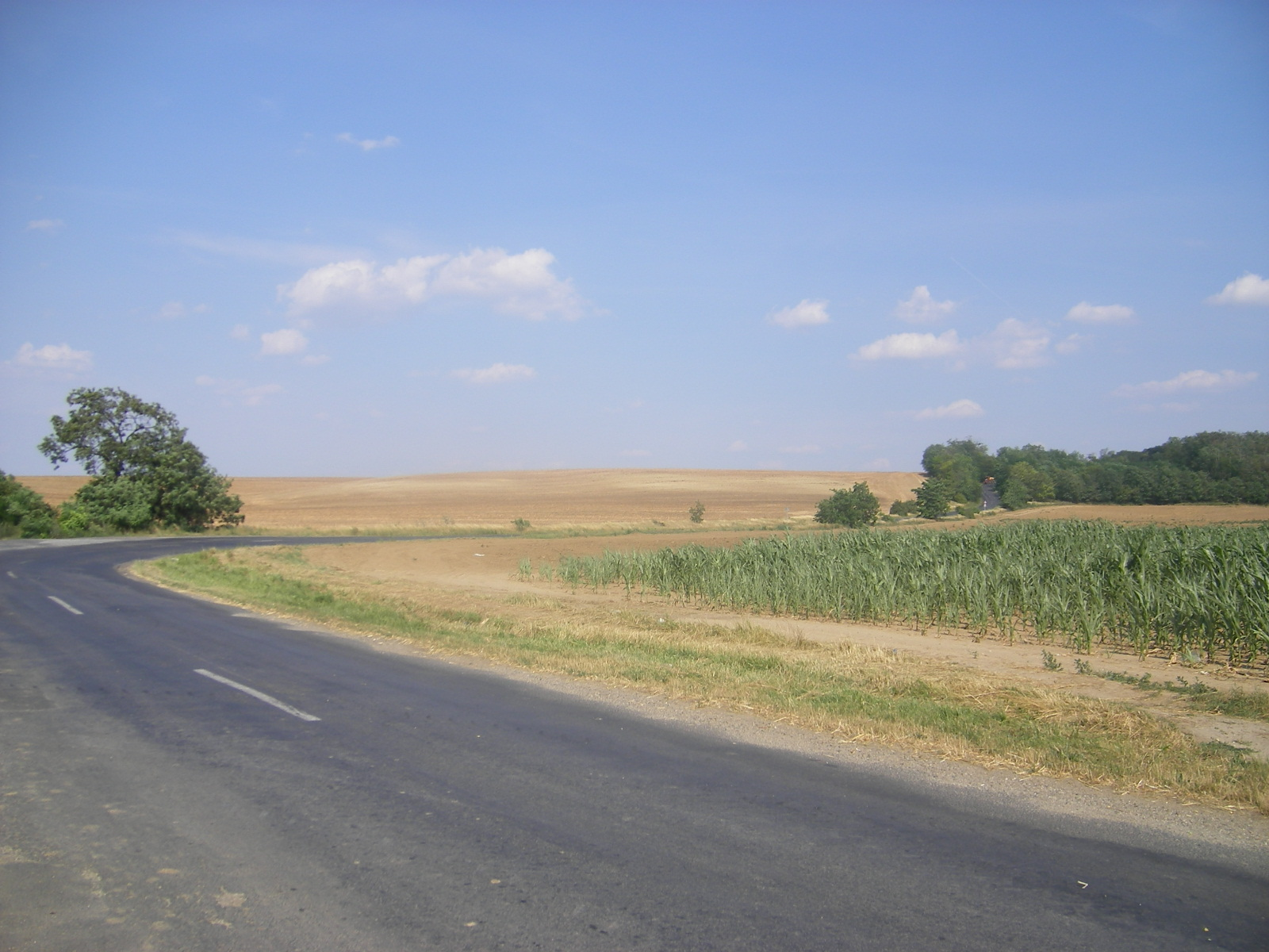 Tájkép Bakonybánk és Lázi között